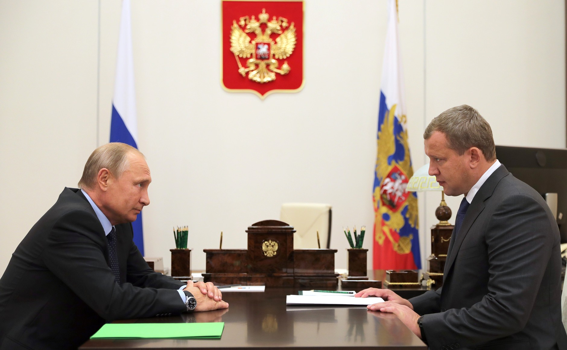 Встреча Владимира Путина с Сергеем Морозовым, в ходе которой сообщено о решении назначить его временно исполняющим обязанности губернатора Астраханской области.